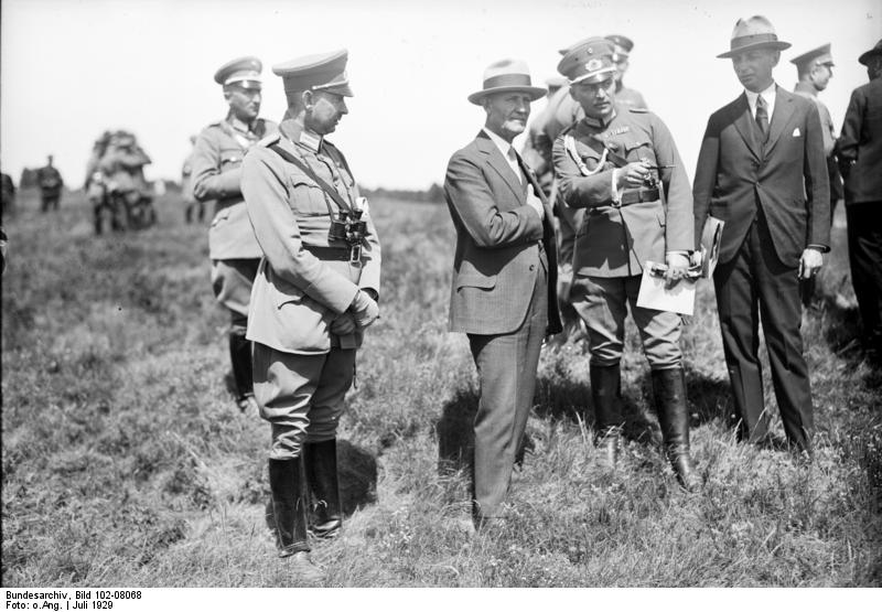 Die erste grosse Manöver-Übung der III. Division in Döberitz! fand unter Anwesenheit des Reichswehrministers Groener, des Chefs der Heeresleitung General Heye, sowie des amerikanischen Kommandeurs General W.D.Connor, dem Leiter der Heereskriegsschule der Vereinigten Staaten statt. Der amerikanische Kommandeur der Heeres-Kriegsschule in den Vereinigten Staaten W.D. Connor wohnt in zivil den Manöverübungen der III. Division bei. Ein Offizier erläutert ihm die Gefechtslage.